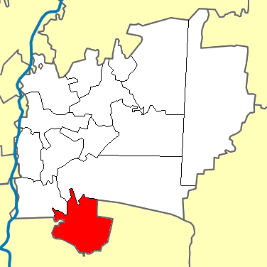 Верхоторська сільська рада